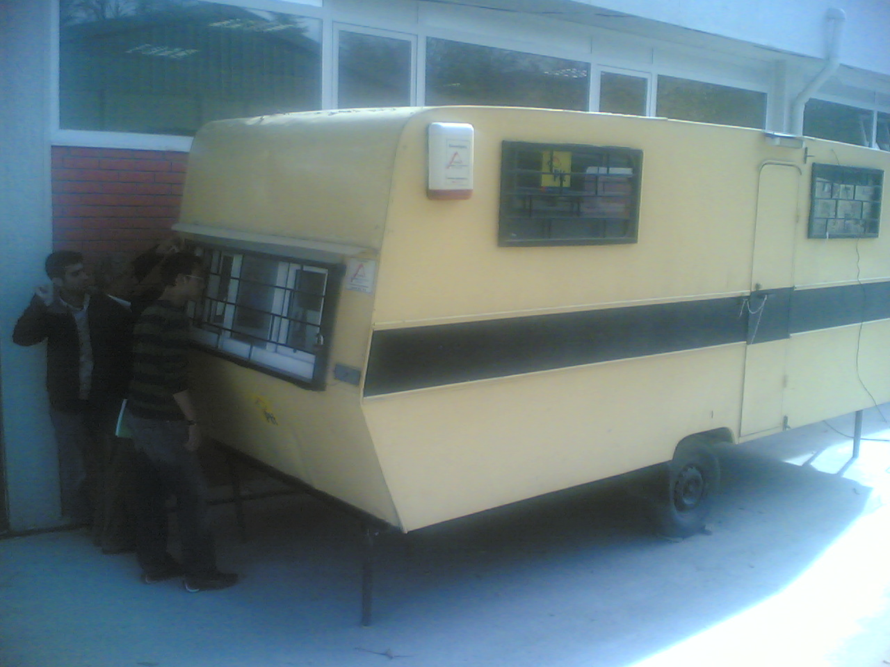 PTT'nin gezici hizmet aracı